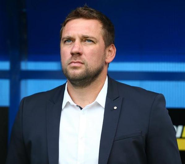 Олександр Бабич - головний тренер Чорноморця (Одеса)